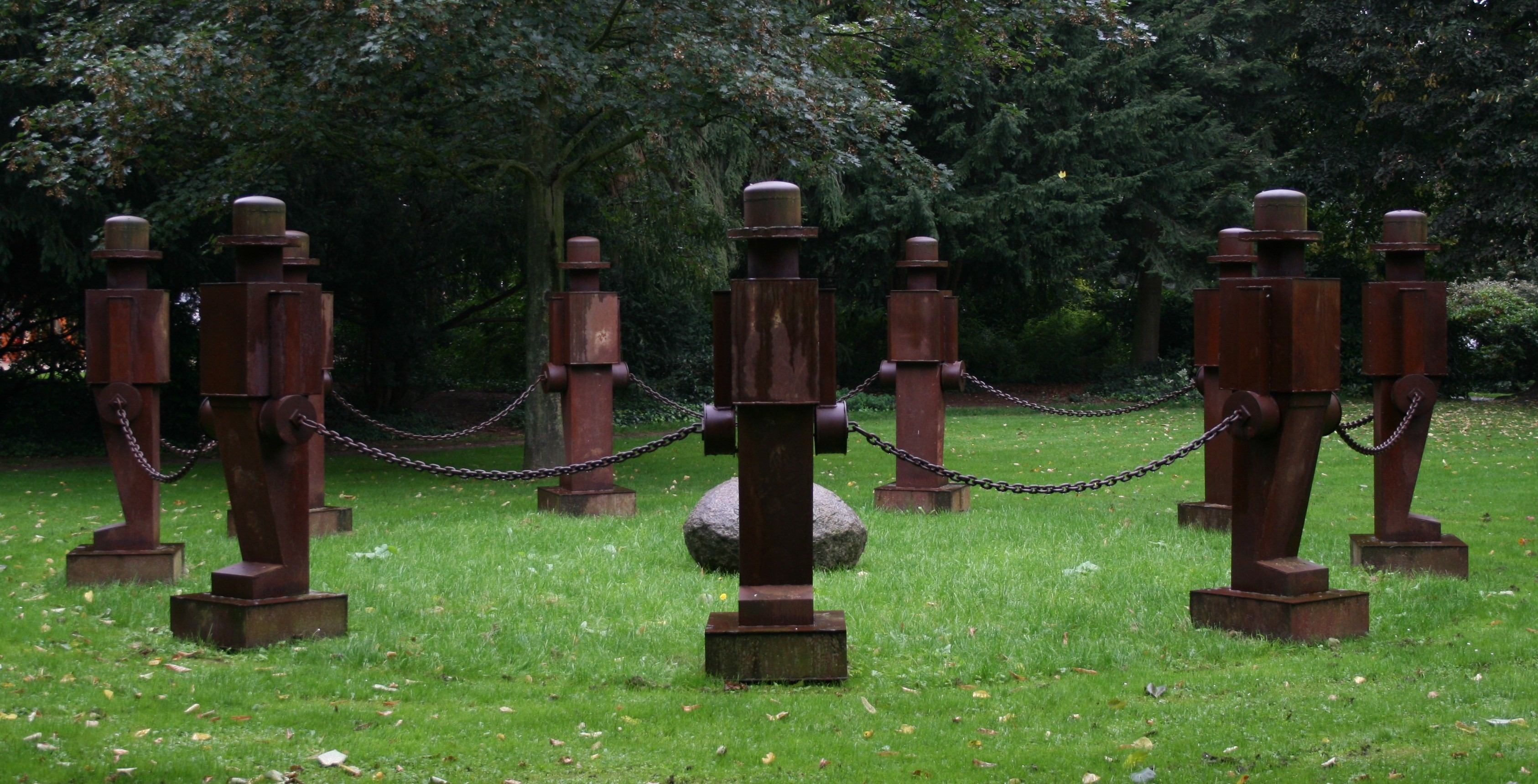 Skupltur "Wächter der Kinder" im Casinogarten in Viersen. Selbst fotografiert.